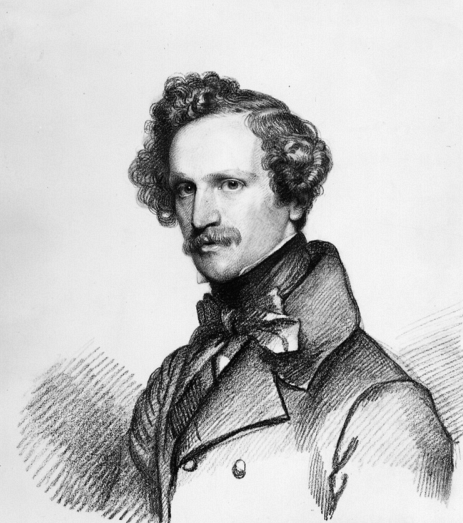 Portrait Eduard Bendemann